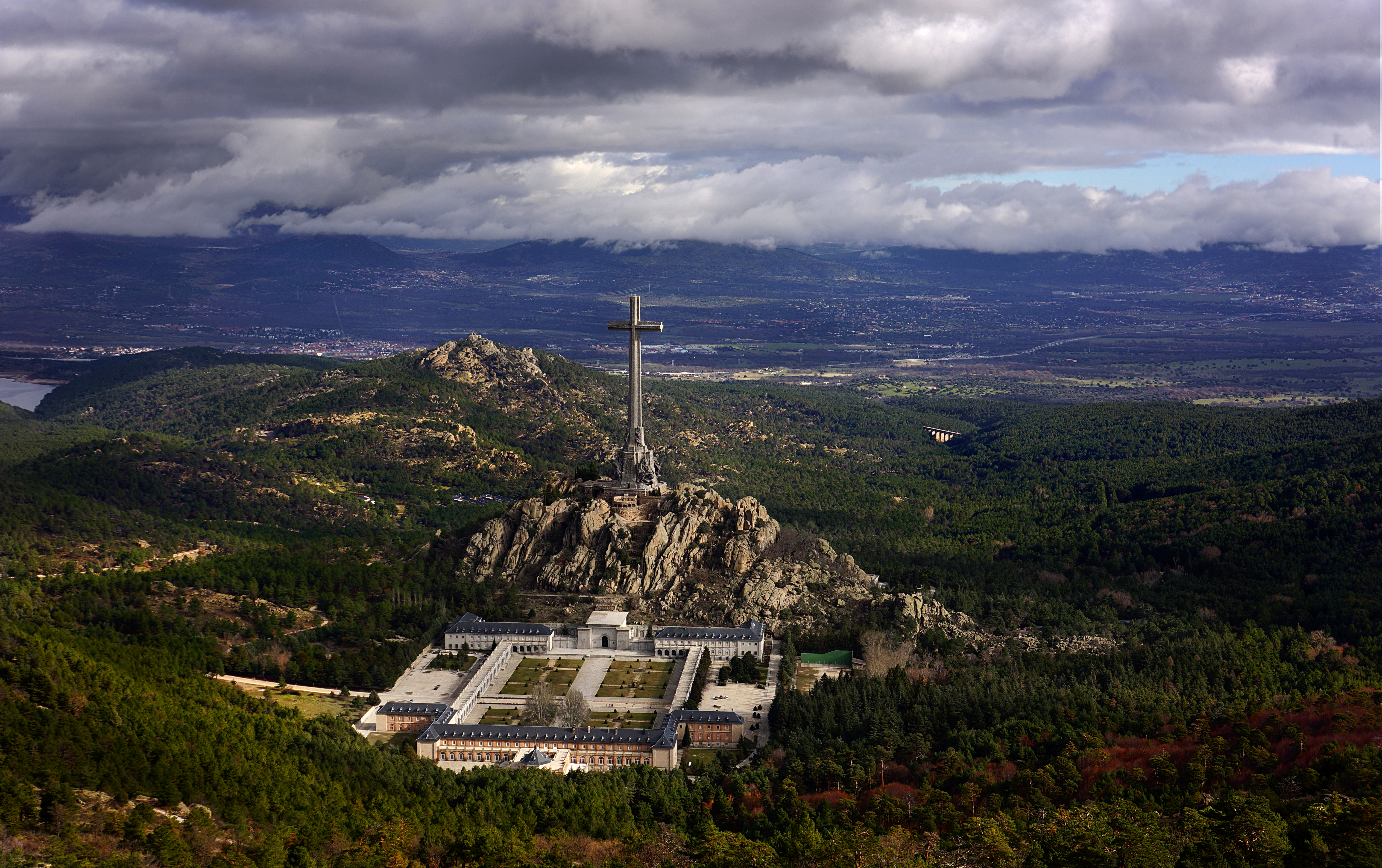 Cuelgamuros, también conocido como El Valle de los Caídos o la Abadía de la Santa Cruz del Valle de los Caídos